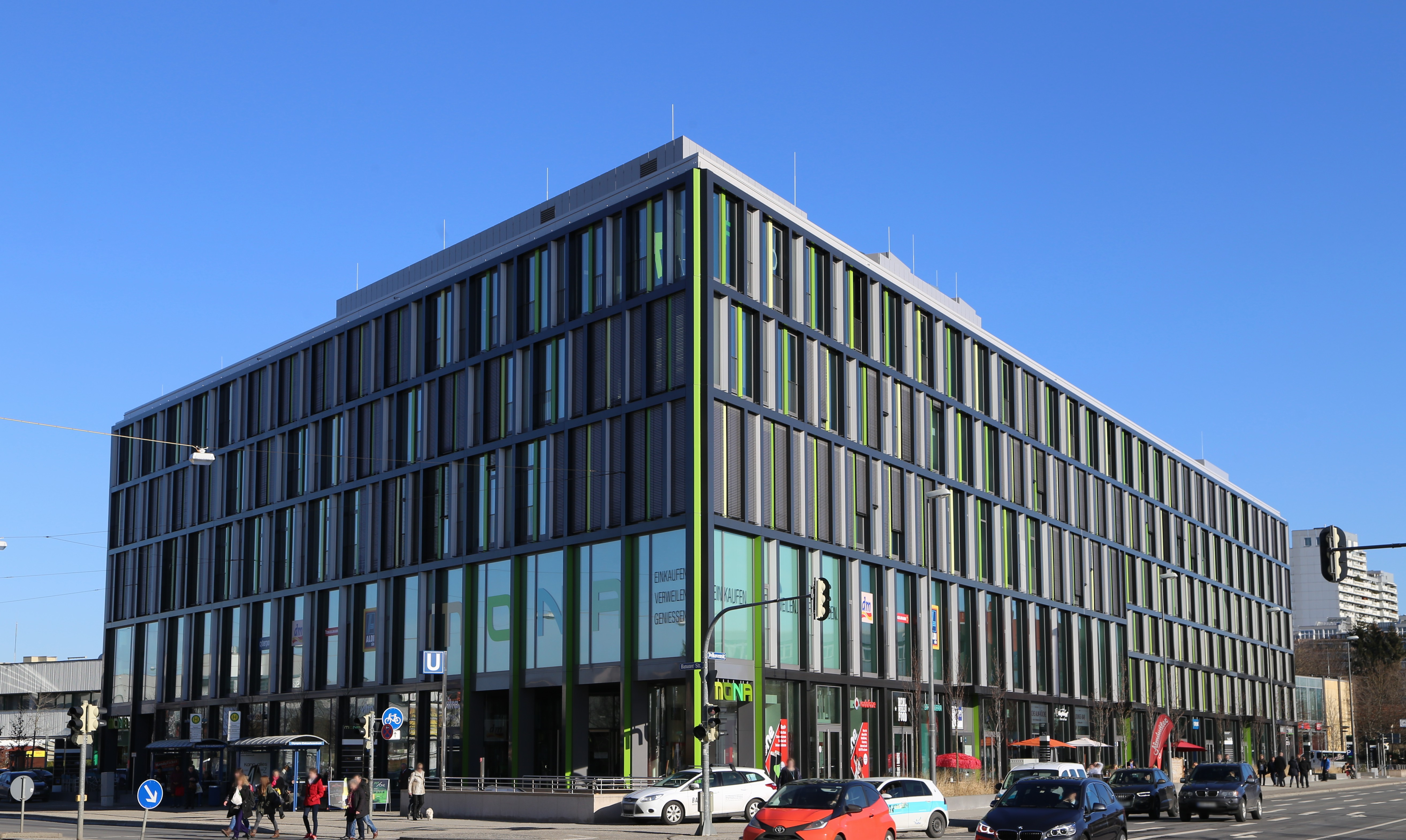 Mona (Einkaufszentrum), Pelkovenstraße in Moosach, München